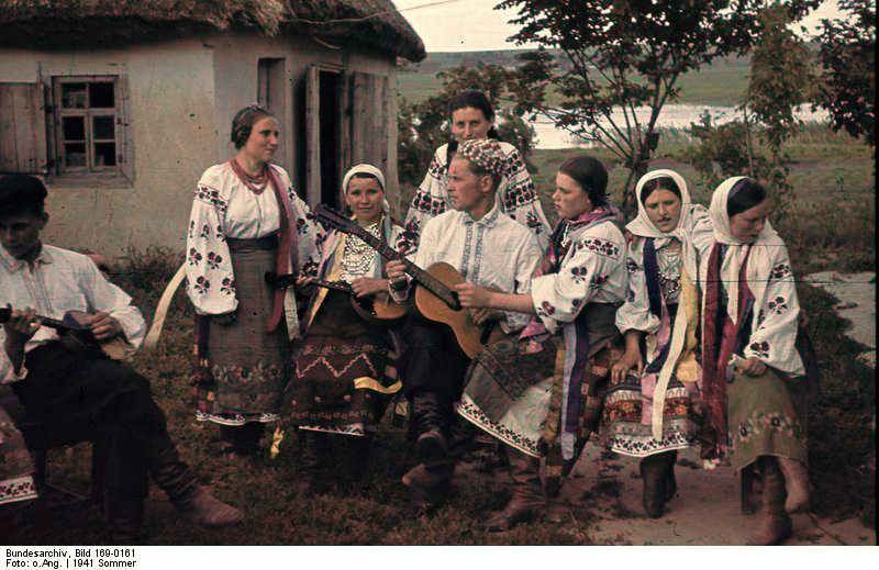 Die Bevölkerung der Ukraine aus der Gegend von Poltawa mit ihrer Nationaltracht September 1941